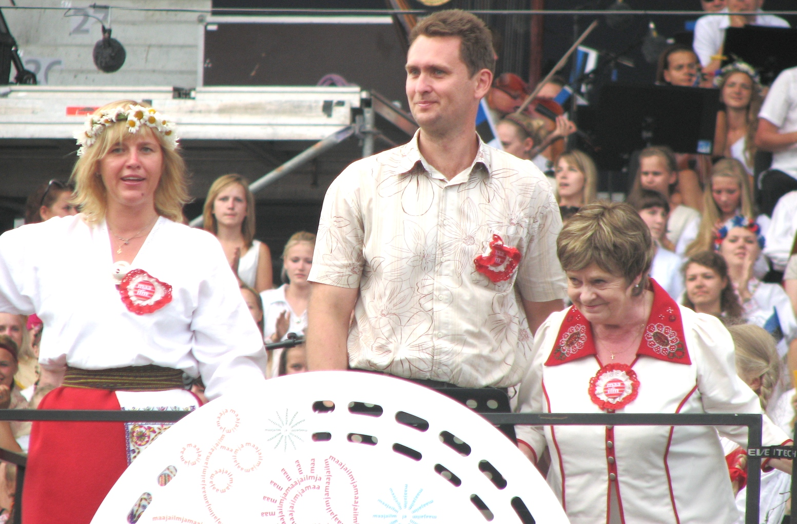 Triin Koch, Aare Kruusimäe ja Leelo Tungal XI noorte laulu- ja tantsupeol pärast neidudekoori esitatud "Ilusa rõõmu laulu".